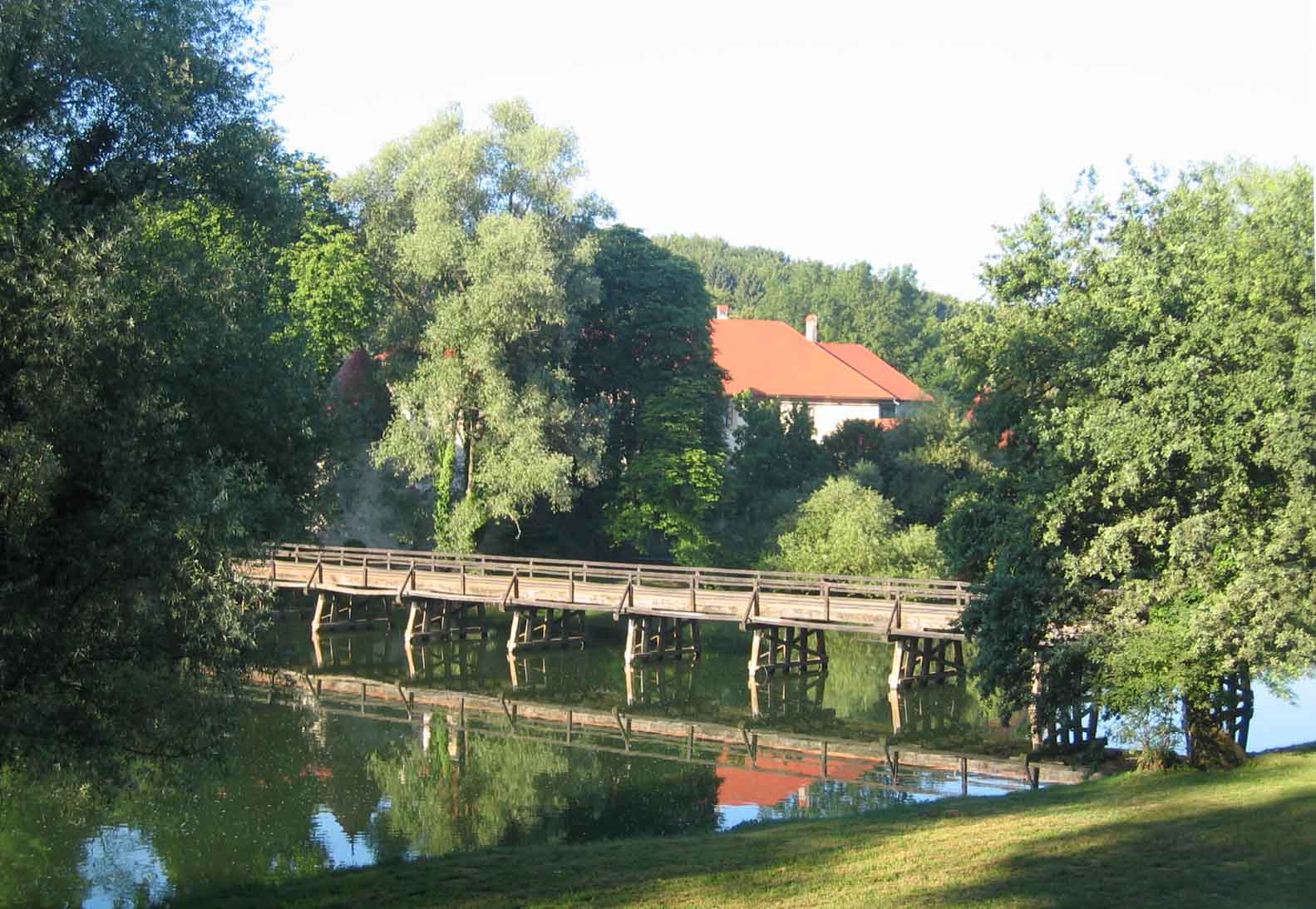 Otočec, at Krka river, Slovenia photo:Ziga 08:05, 2 April 2007 (UTC)